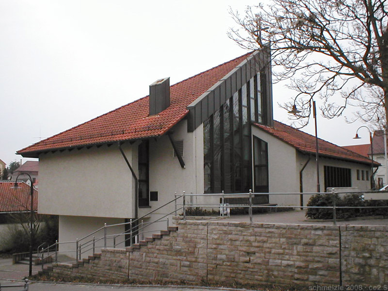 Evangelische Dietrich-Bonhoeffer-Kirche (erbaut 1985) in Heilbronn-Kirchhausen